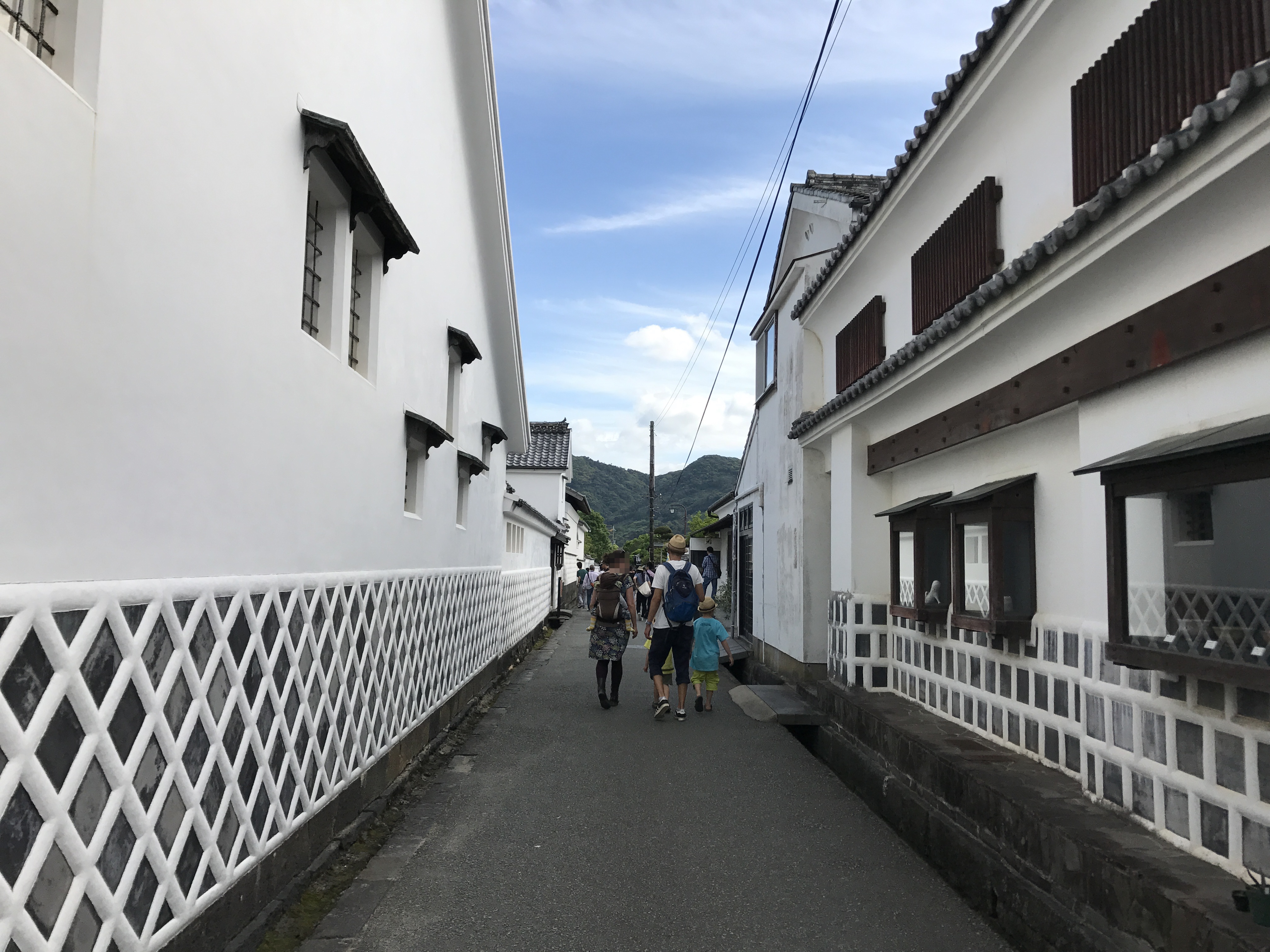 萩城下町の菊屋横丁